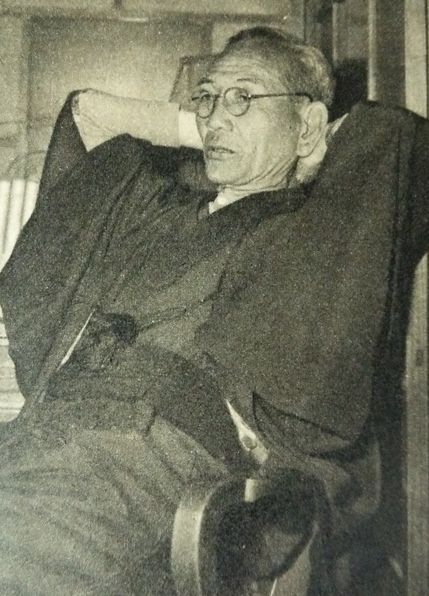 松岡駒吉